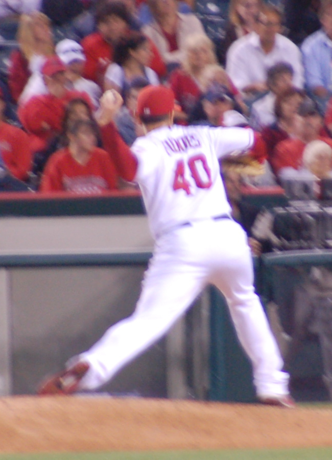 Brian Fuentes